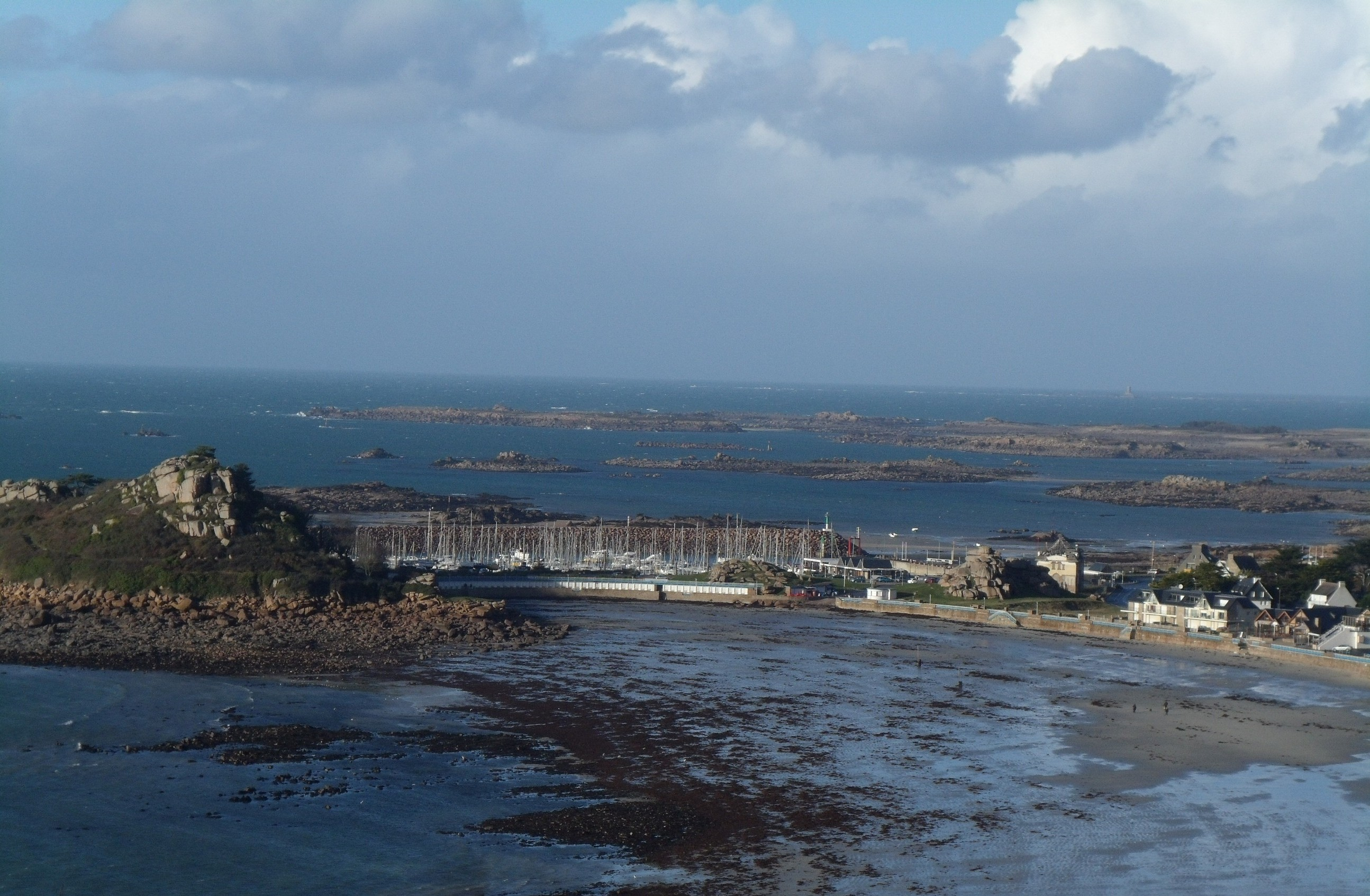 Vue de Trébeurden depuis la pointe de Bihit; Au 1er plan, la plage de Tresmeur